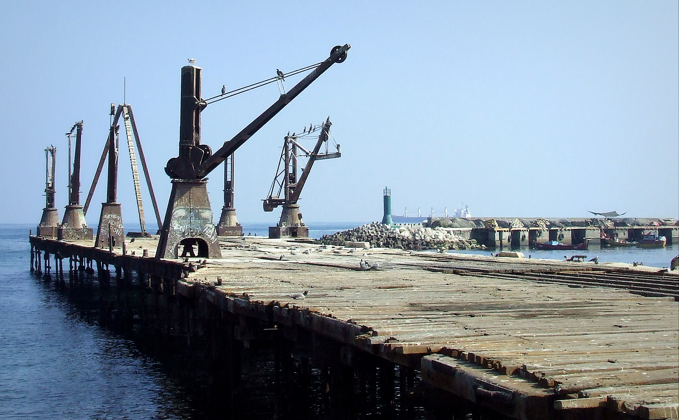 Muelle Salitrero de la ex Compañía Melbourne Clark This is a photo of a national monument in Chile: 309